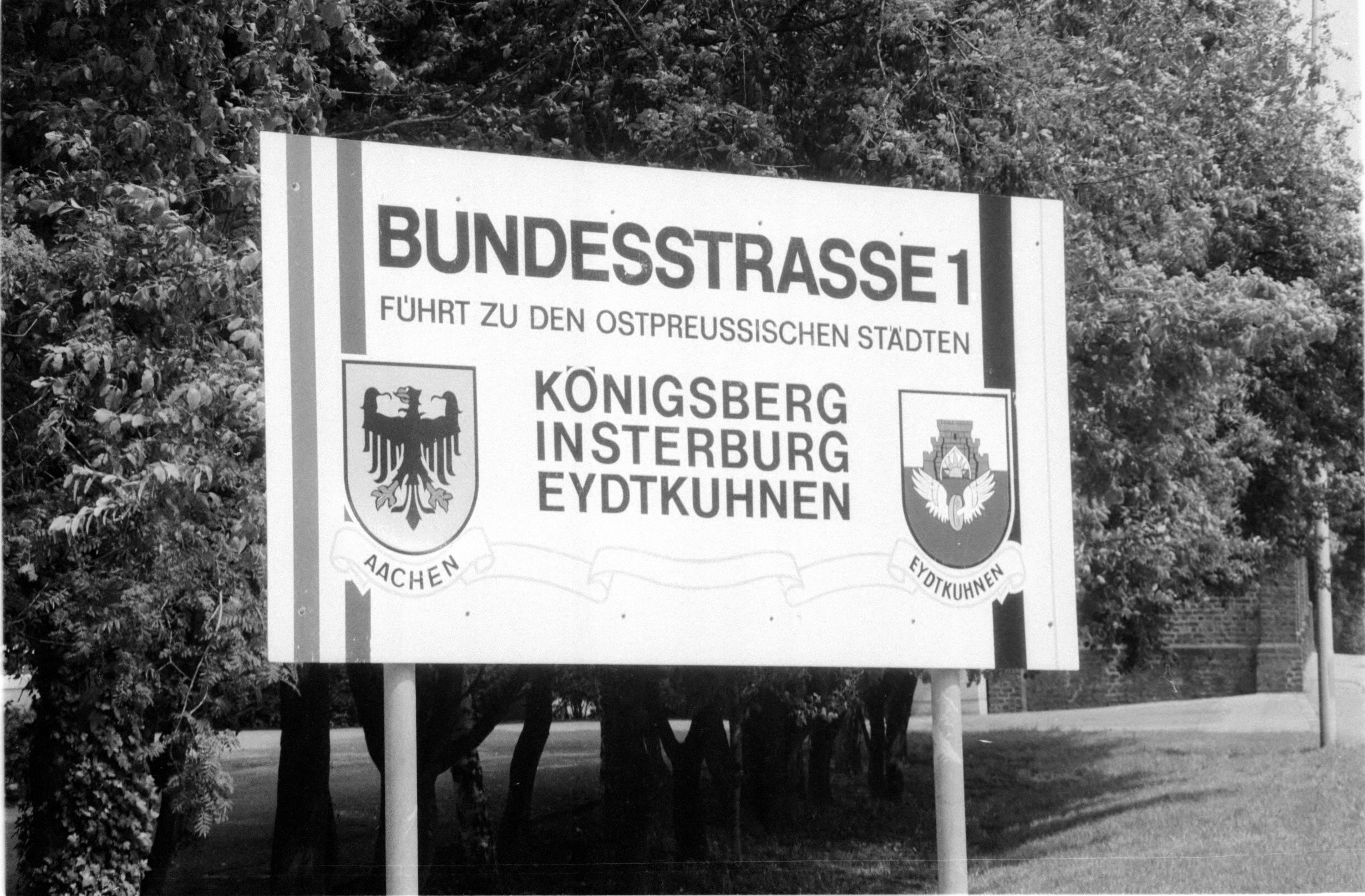 Schild am Beginn der B1 in Aachen 1981. Hinweis auf die Stadtpatenschaft Aachens über die Vertriebenen aus Eydtkuhnen.